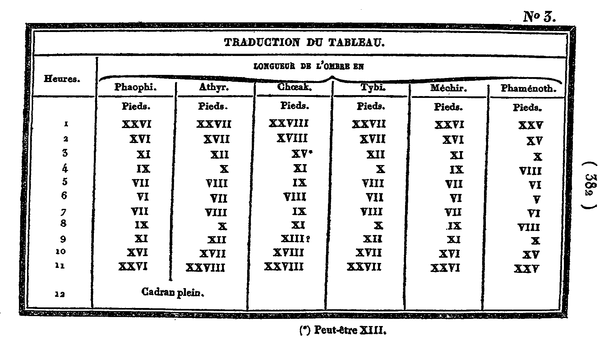 Reconstitution partielle de la table d'ombre de Taphis